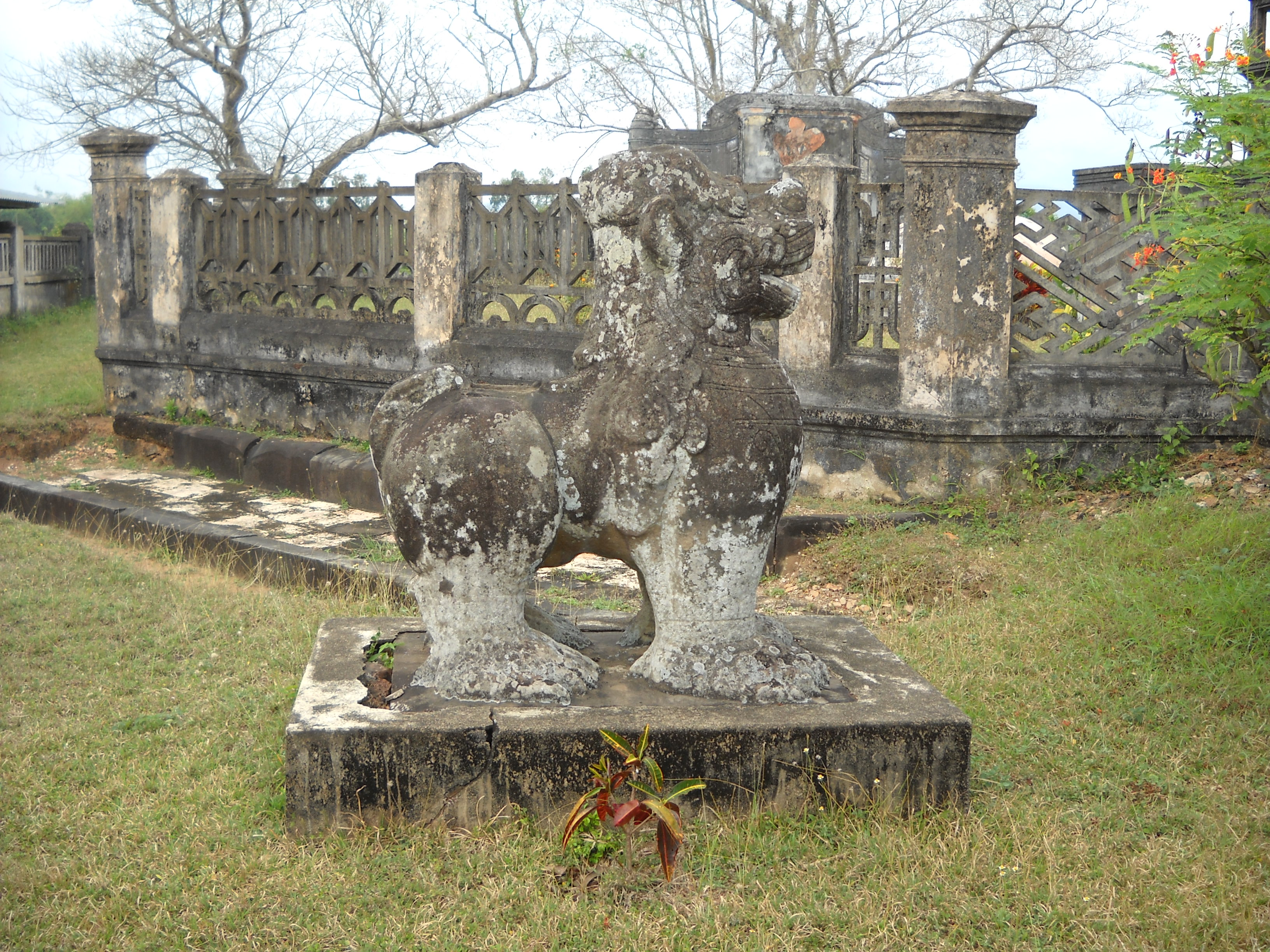 Sư tử đá của Chăm Pa tại Đồ Bàn đang còn.